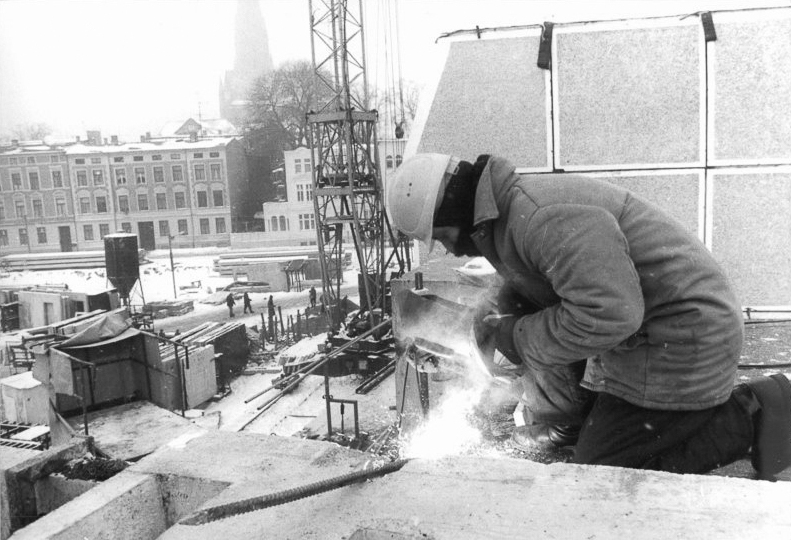 Schwerin, Schweisser, Winter ADN-ZB Pätzold-23.1.1987 Schwerin: Plan-Schweißer Willi Hayn gehört zu den Montagekollektiven in Schwerins innerstädtischem Neubau- und Rekonstruktionsgebiet "Großer Moor", die am kommenden Wochenende termingemäß einen weiteren Wohnblock übergeben wollen. Mit vorgewärmten Betonelementen und zum Schweißen vorgesehenen Stahldrähten kann auch bei unter minus 15 Grad zügig weitermontiert werden. Sand, Wasser und Zement werden in speziellen Containern ebenfalls über dem Gefrierpunkt gehalten. Bereits am vergangenen Wochenende hatten die Bauleute den bestehenden Terminverzug, der bei Temperaturen unter 20 Grad minus entstanden war, weitestgehend wettgemacht. Mit der Initiativeschicht am kommenden Sonnabend wollen sie Plangleichheit erreichen. - siehe auch 1987-0123-15N